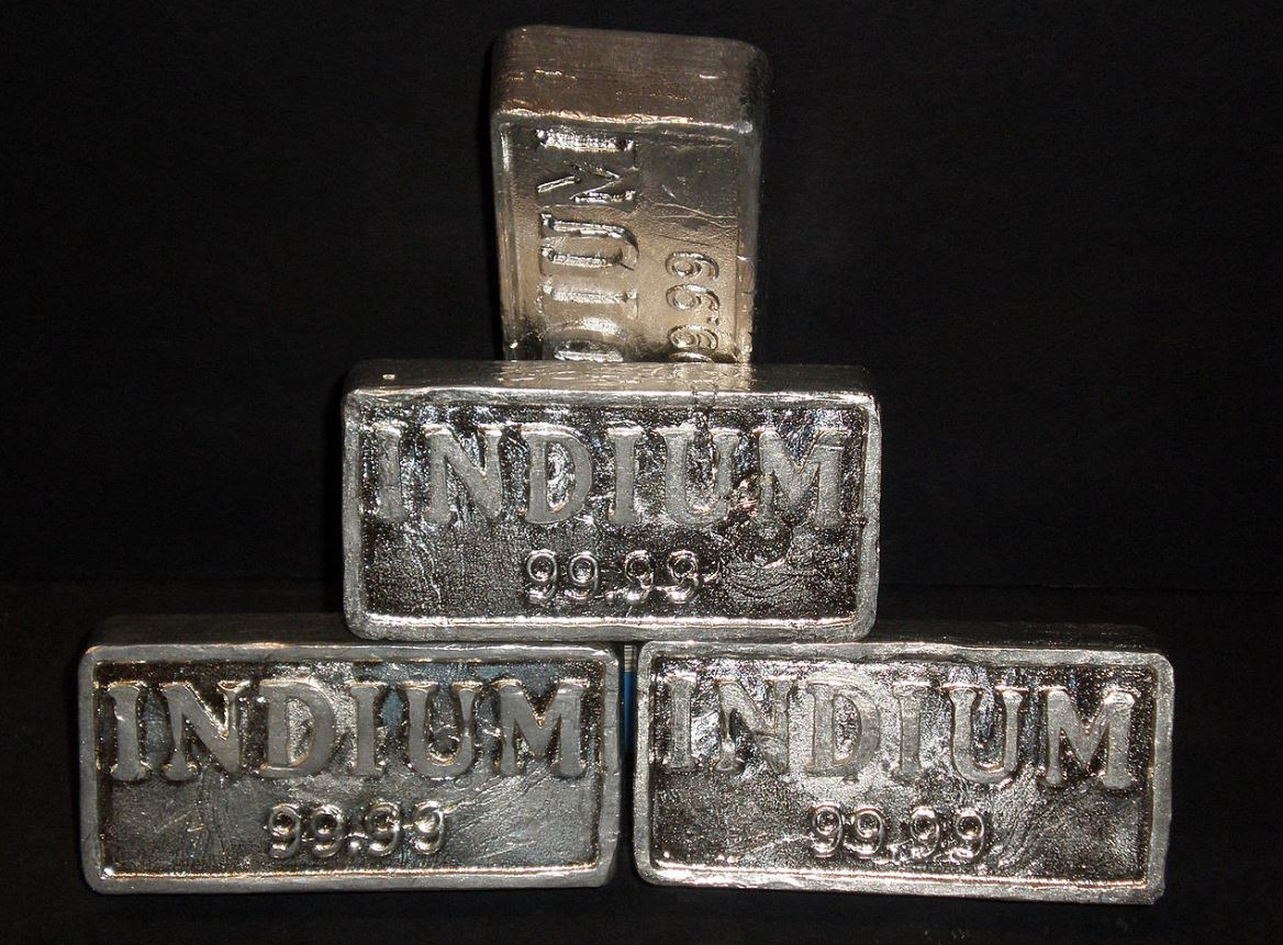 Tehličky India